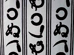 ゆかた